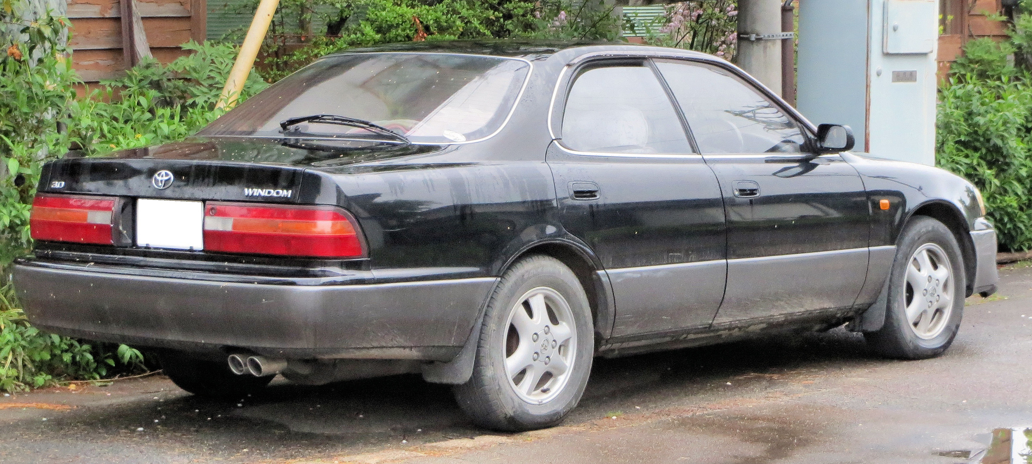 トヨタウィンダム3.0 VCV10